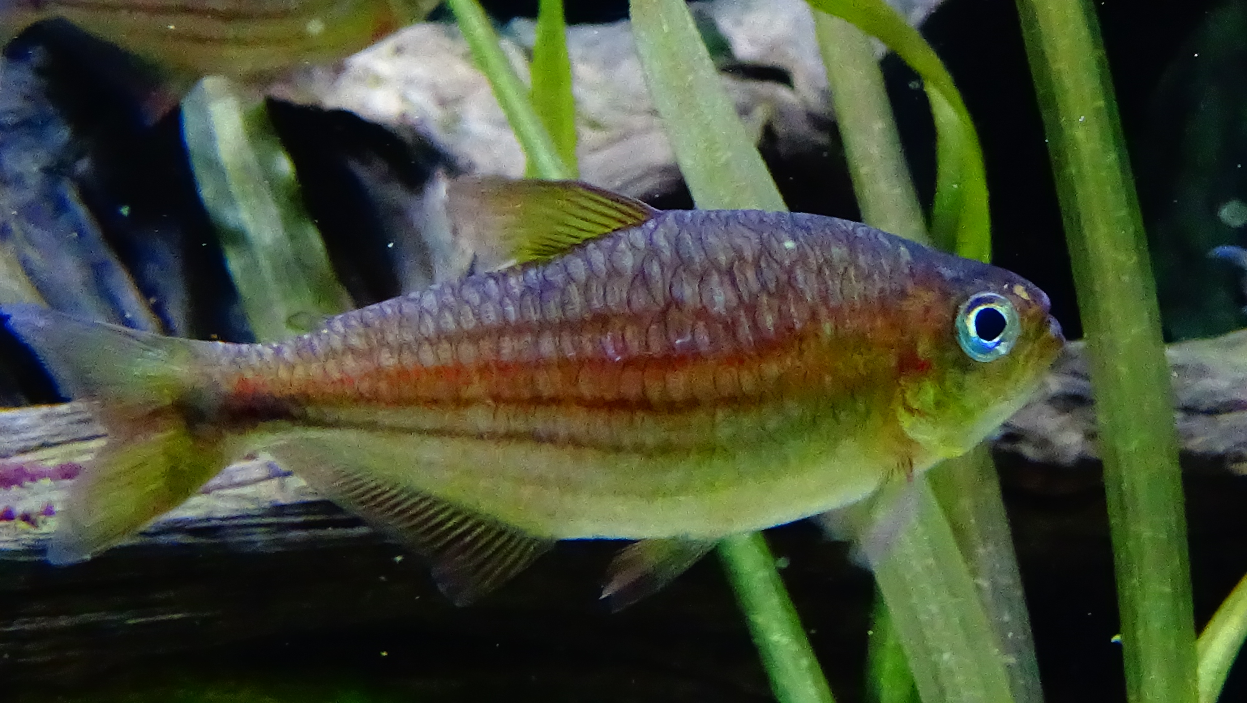 Moenkhausia agnesae - Aquarium Tropicale du Palais de la Portes Dorée - 07/2015